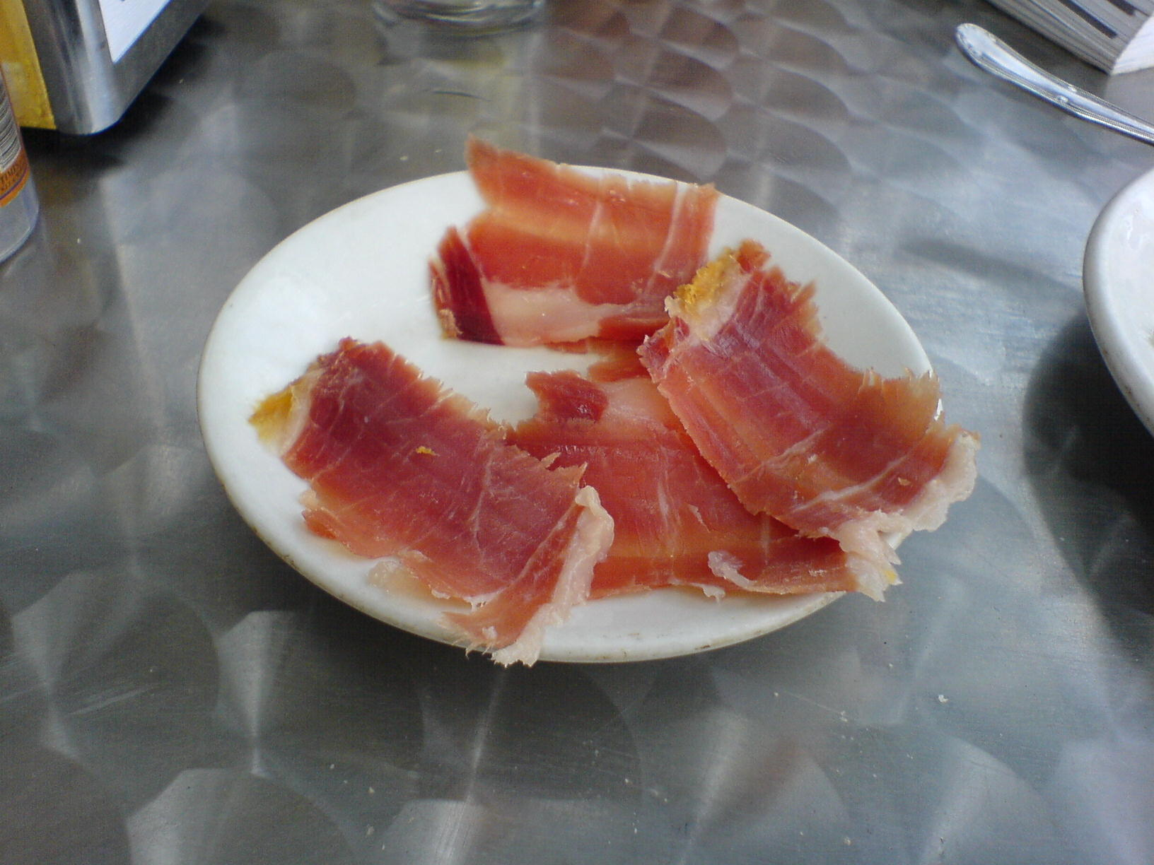 Jamon serrano espanol.